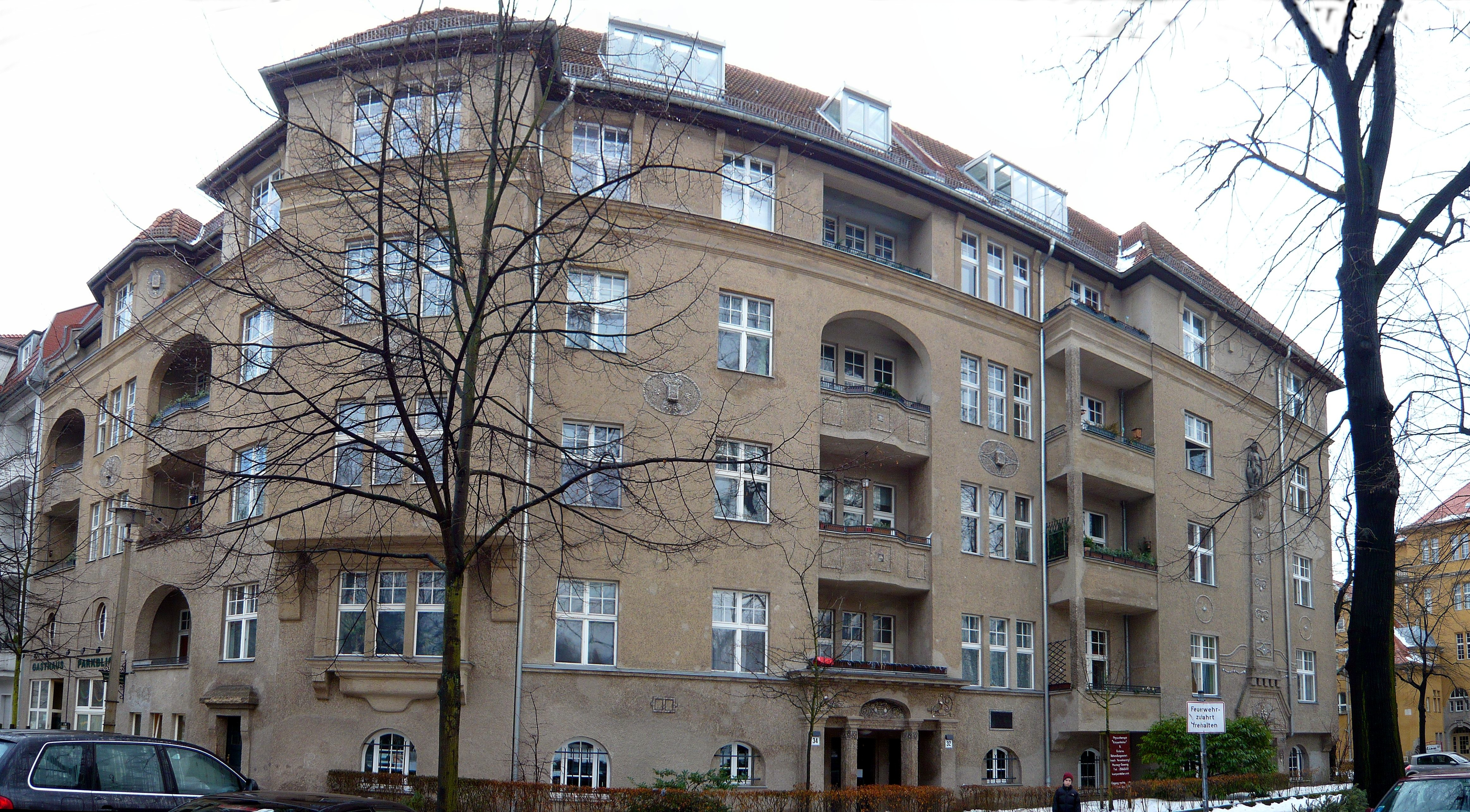 Mehrfamilienwohnhaus-Gruppe in Berlin-Lichtenberg, Parkaue 24/32/34; 1914-1915 von Gustav Gebhardt; unter Denkmalschutz